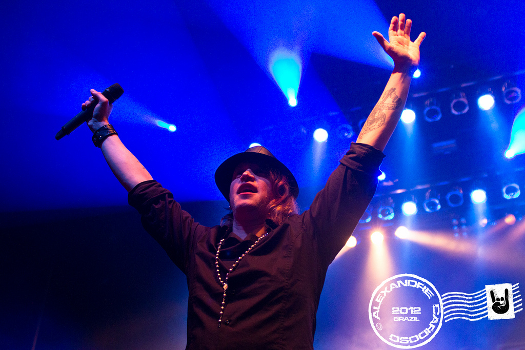 A banda Gotthard ao vivo no HSBC Brasil em 18/05/2012 - São Paulo, Brasil